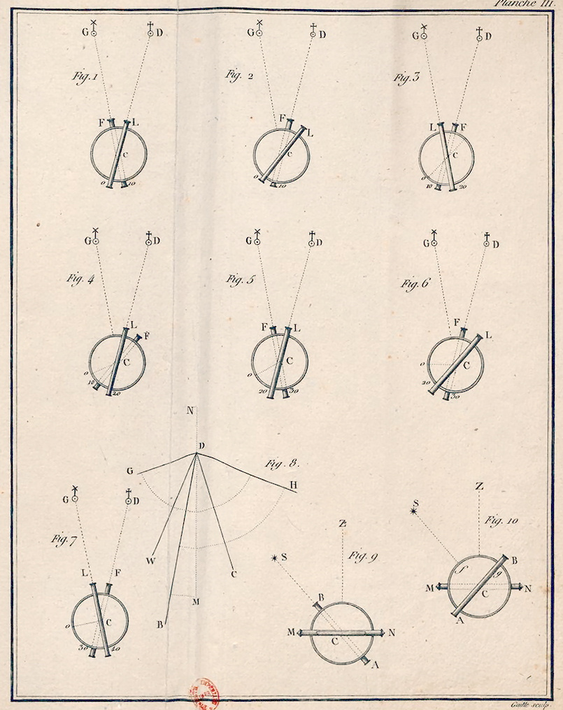 Illustration du principe d'utilisation du cercle répétiteur.